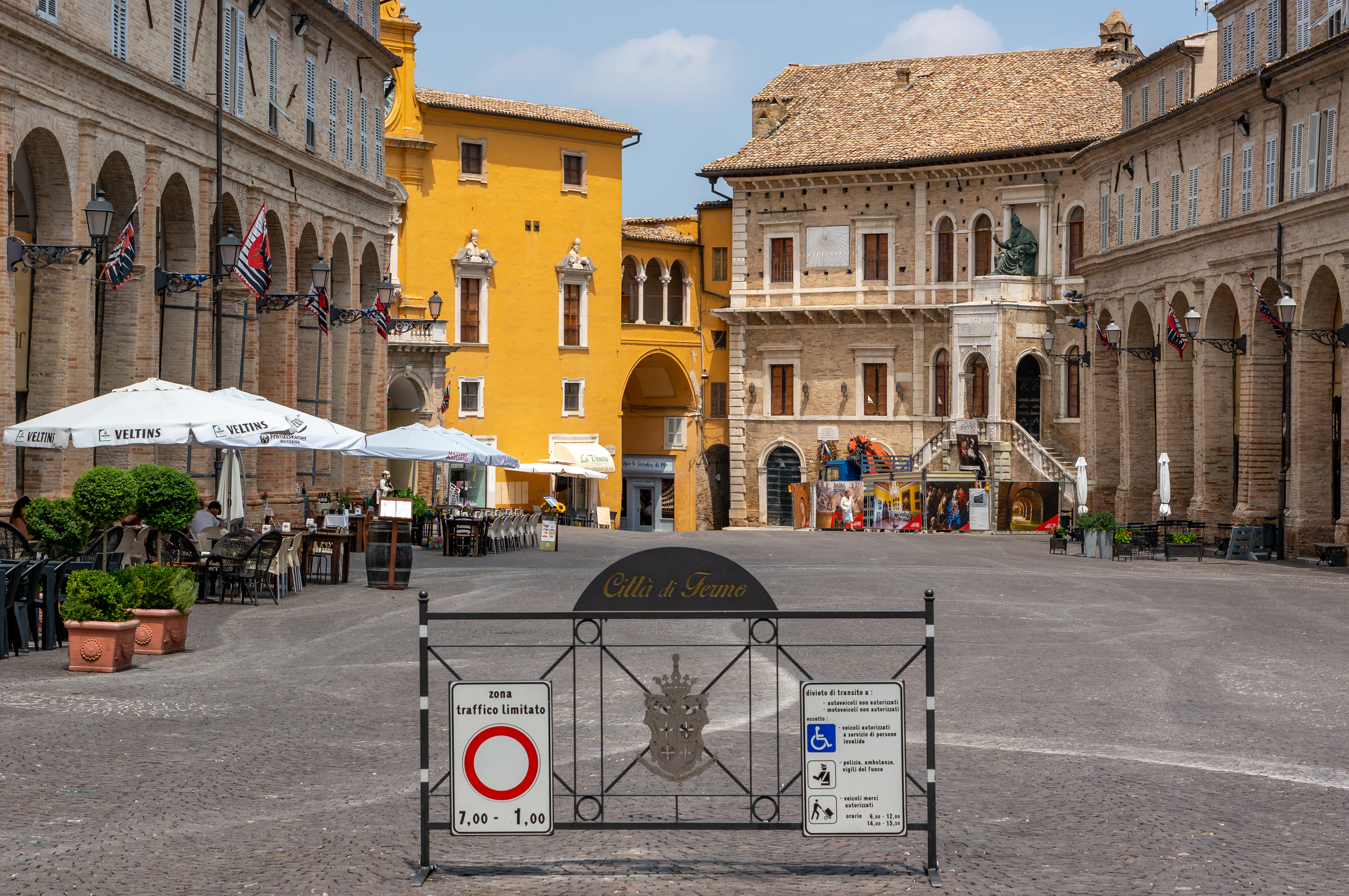 Palazzo dei Priori This is a photo of a monument which is part of cultural heritage of Italy.